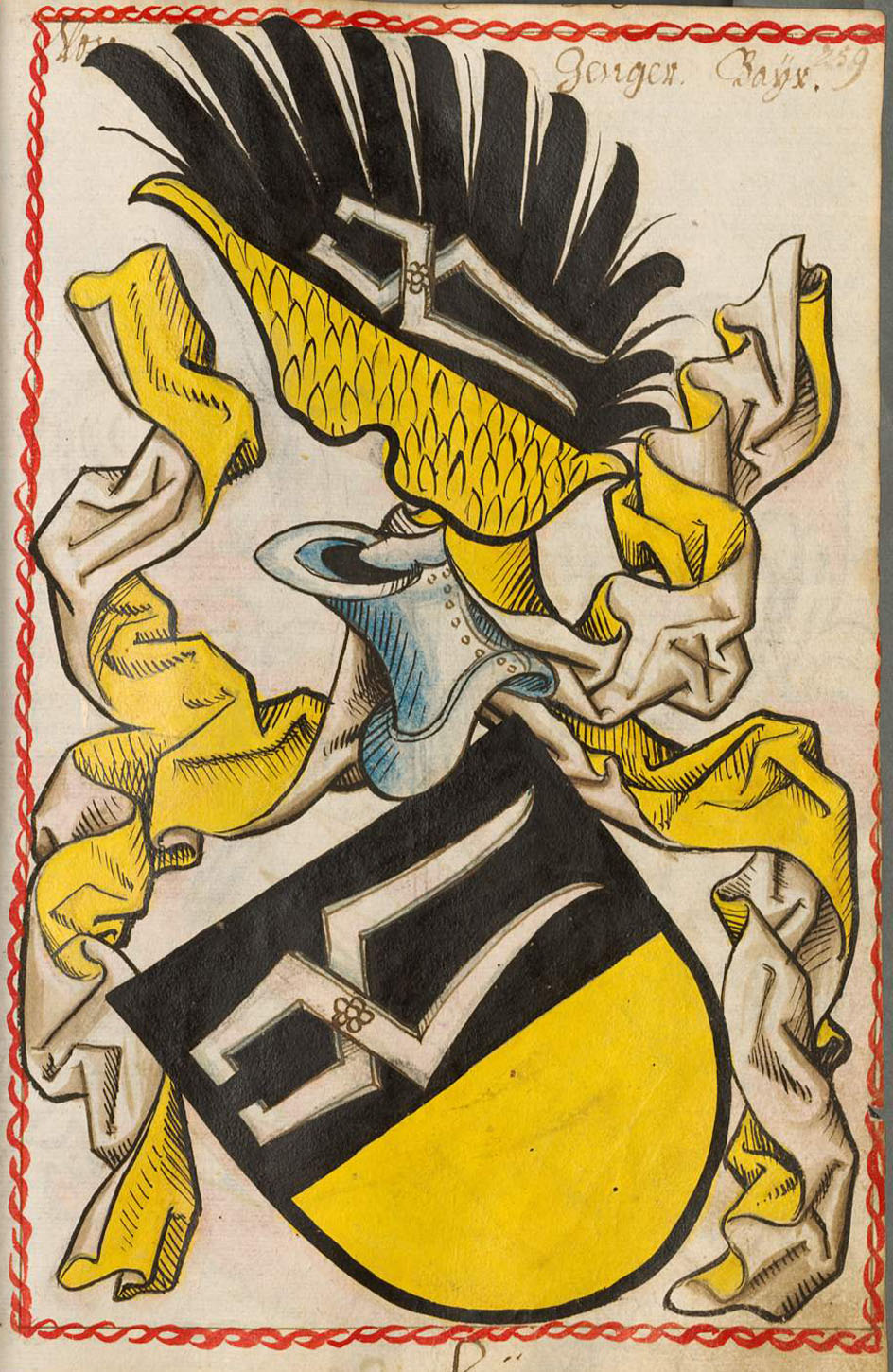 Scheibler'sches Wappenbuch , älterer Teil Bayern Seite 259